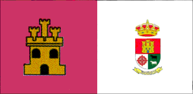 Mestanza flag